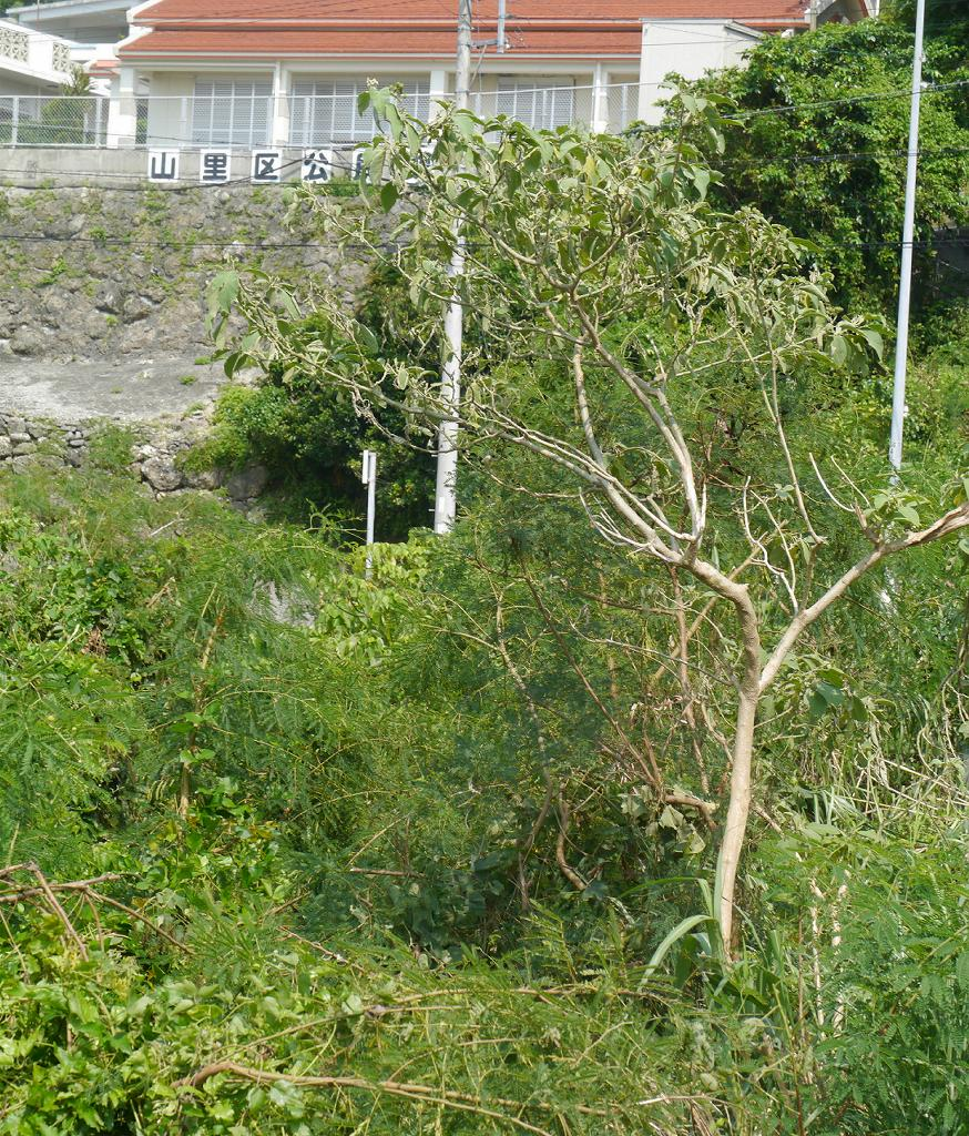 Solanum erianthum：ヤンバルナスビ 2015/08/27 沖縄本島：Okinawa Island, Japan